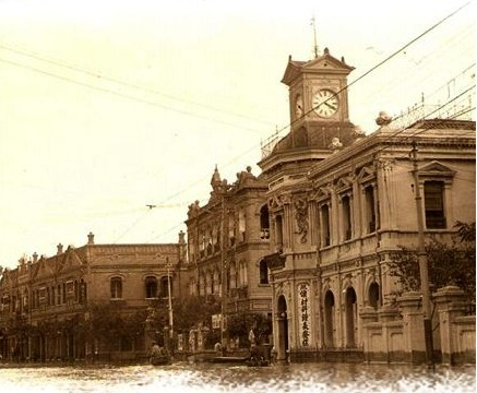 1939天津水灾水灾时期的四面钟